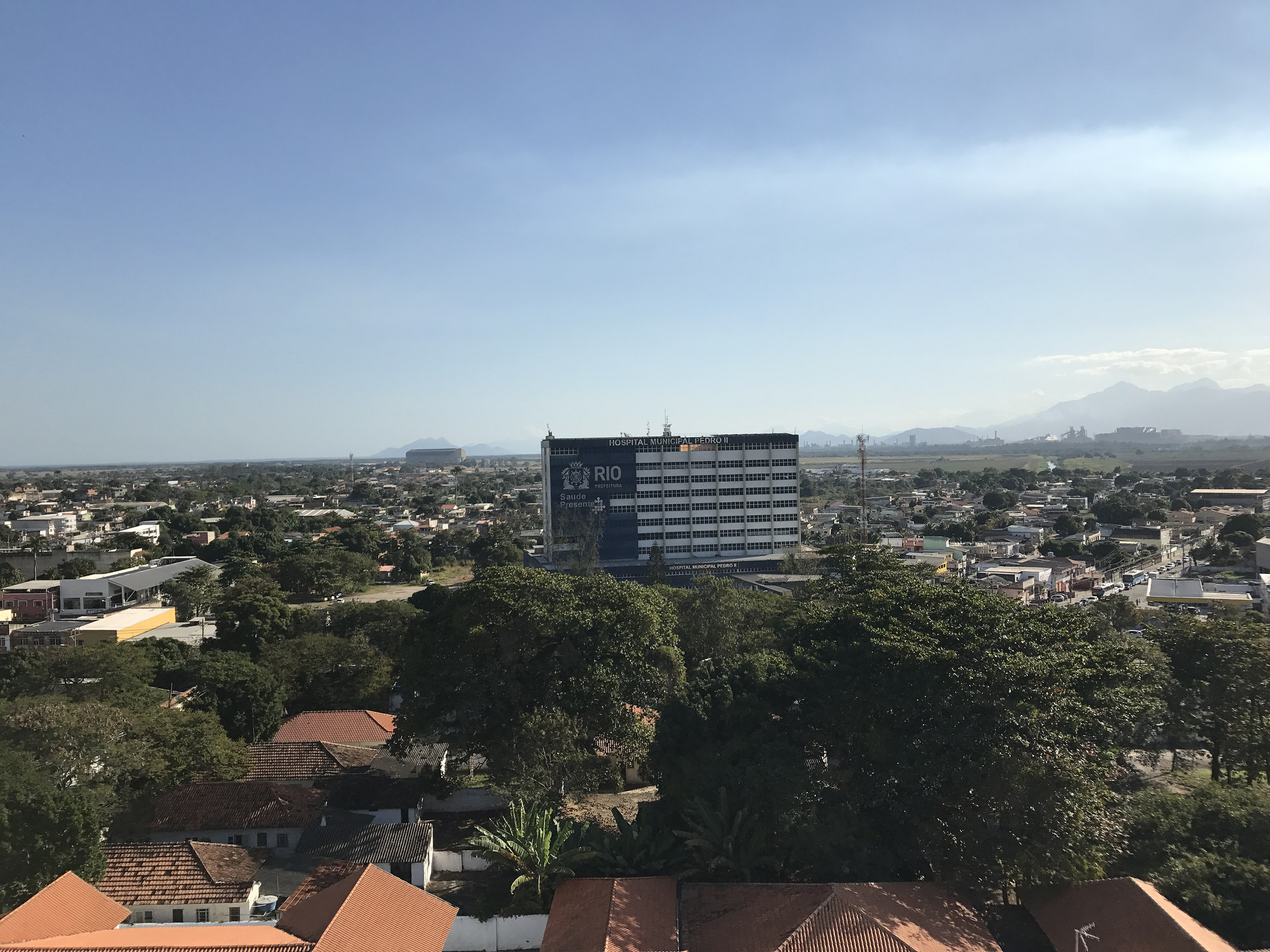 Vista do Hospital Pedro II (Santa Cruz, Rio de Janeiro)